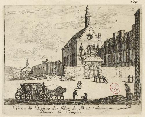 Couvent des Filles du Calvaire